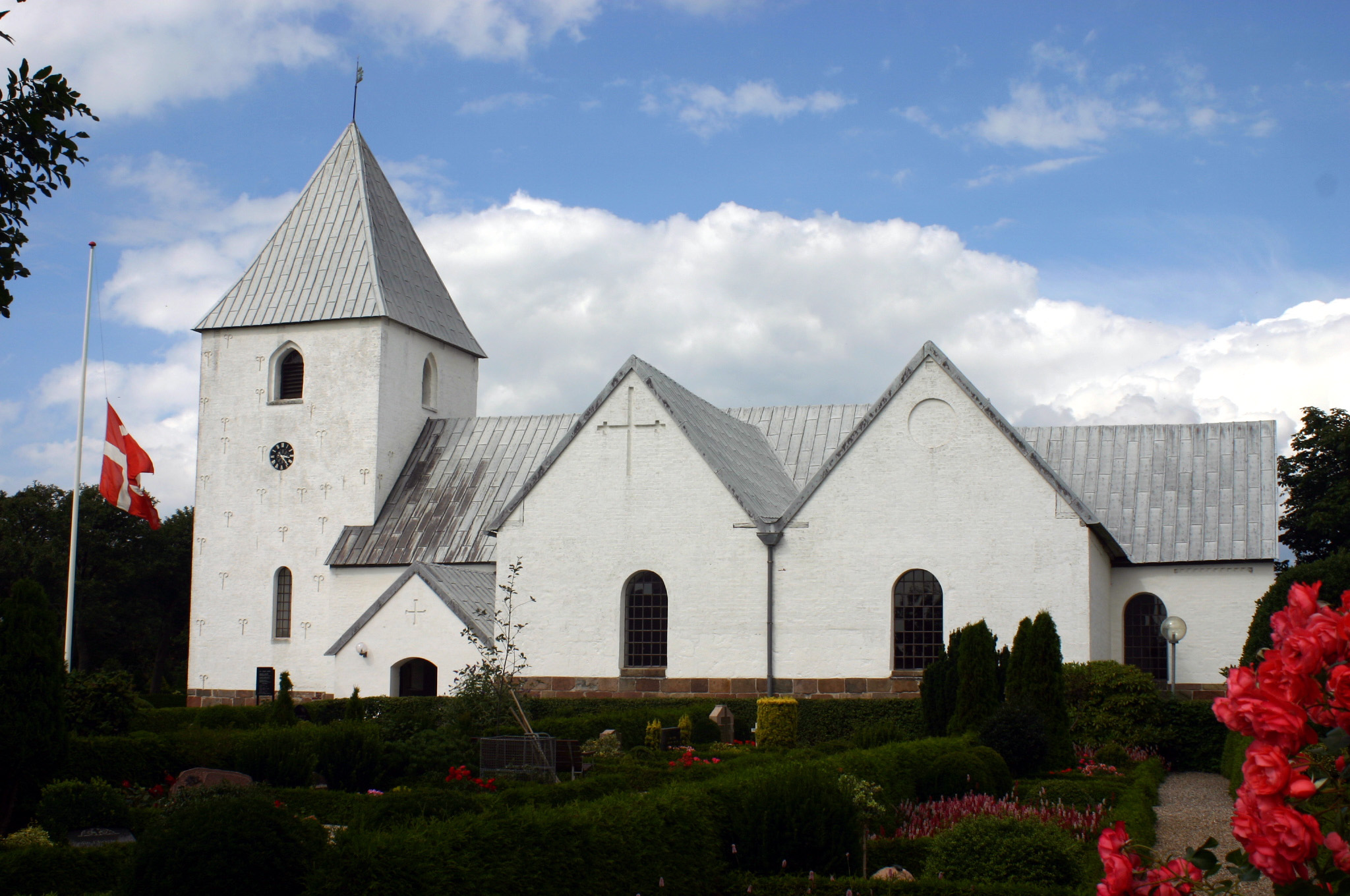 Kloster, Denmark, Church